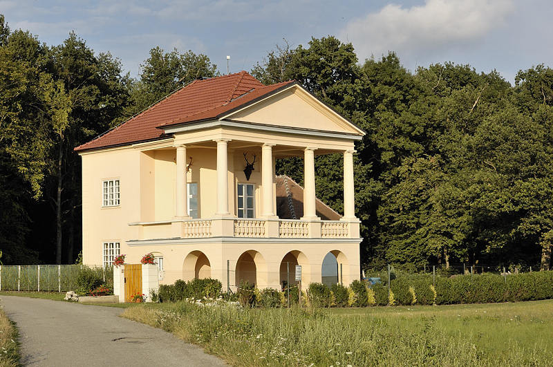 Jadgschlösschen